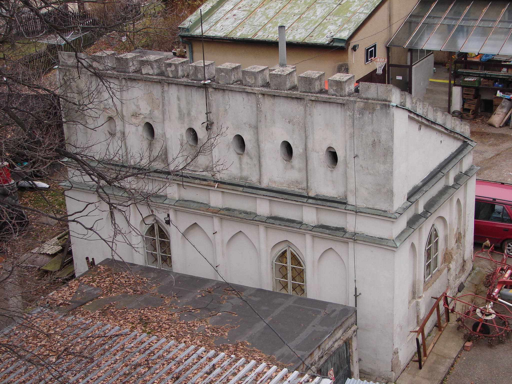 Novogotická hájovna situovaná v blízkosti umělé zříceniny